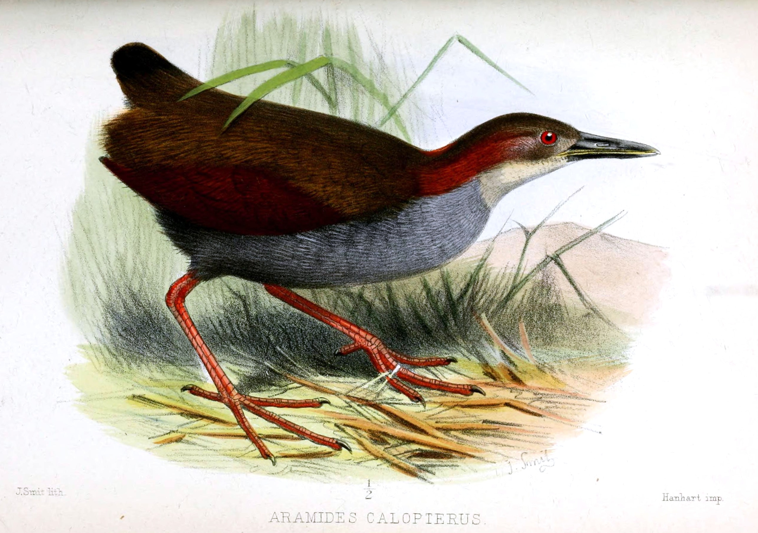 Aramides calopterus